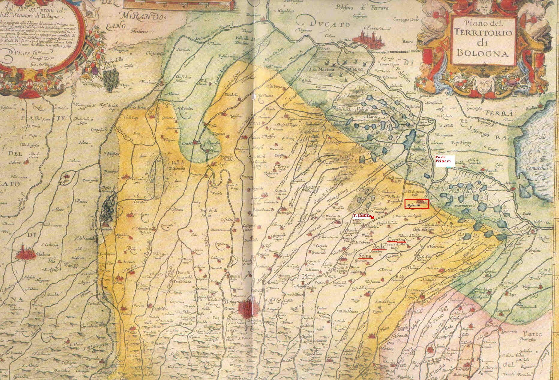 Cartina del 1599 del territorio Bolognese con evidenziati Molinella e la Contea di Selva Malvezzi.